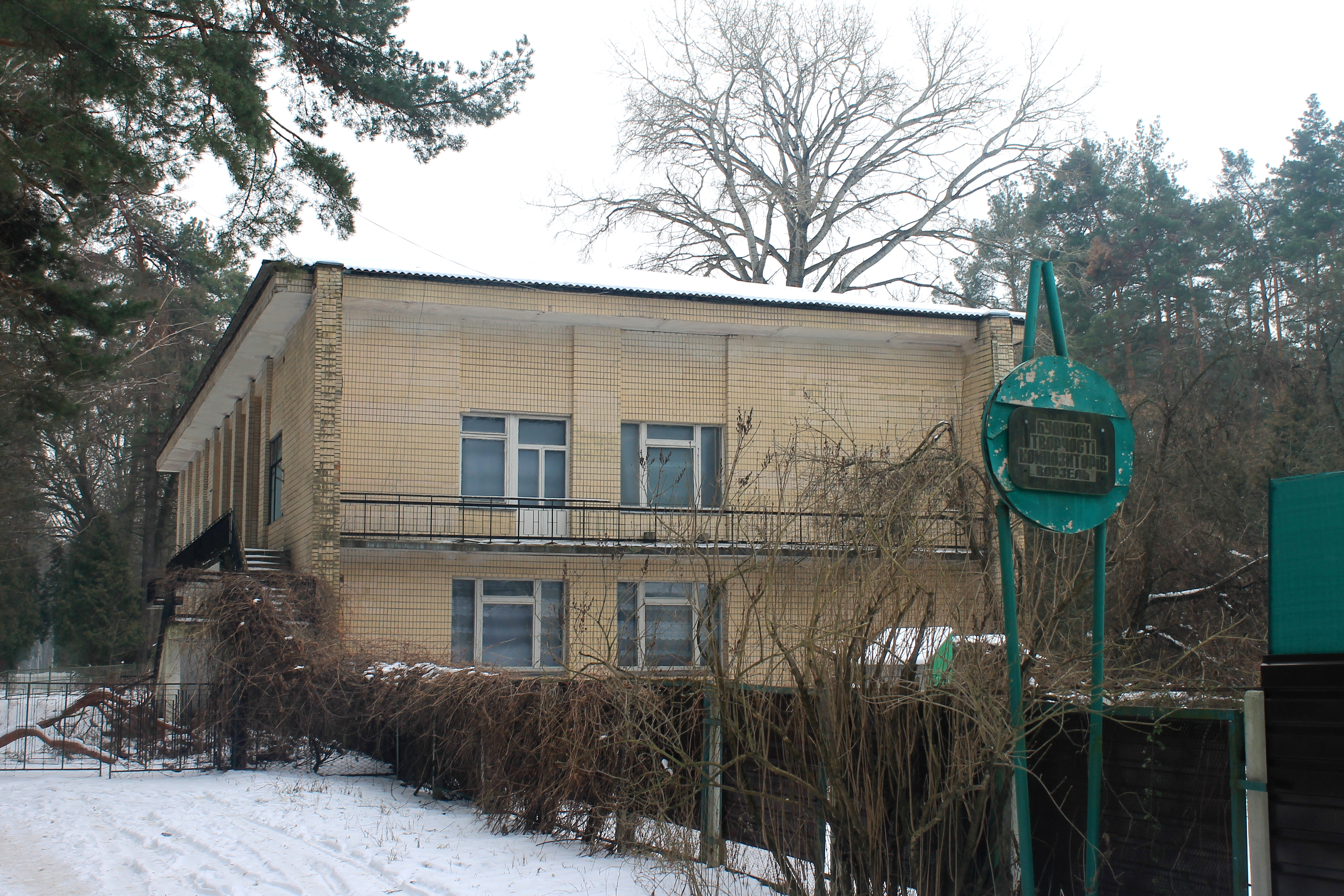 Будинок творчості композиторів Ворзель, 2014